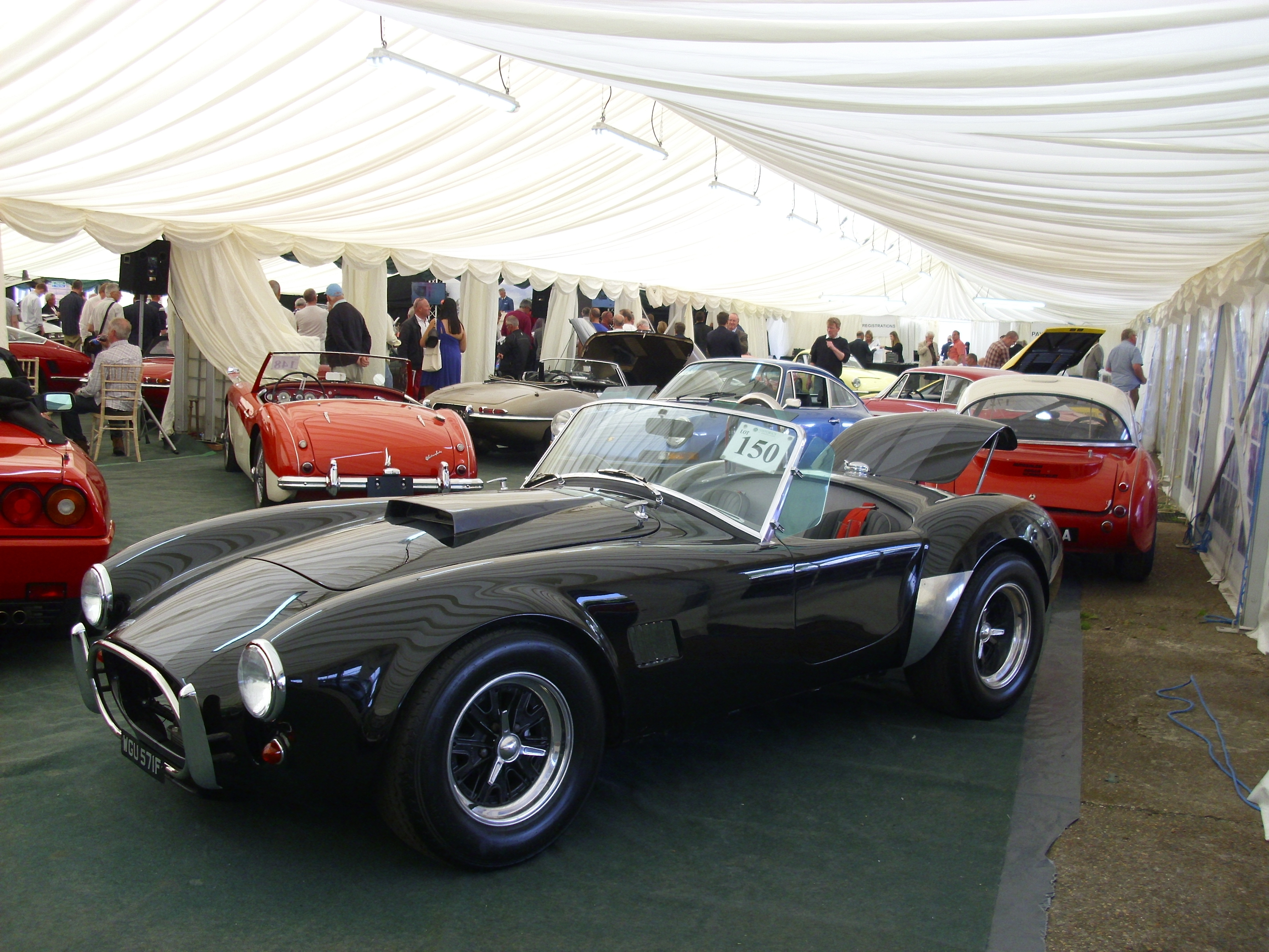 Ram SC Cobra 2014